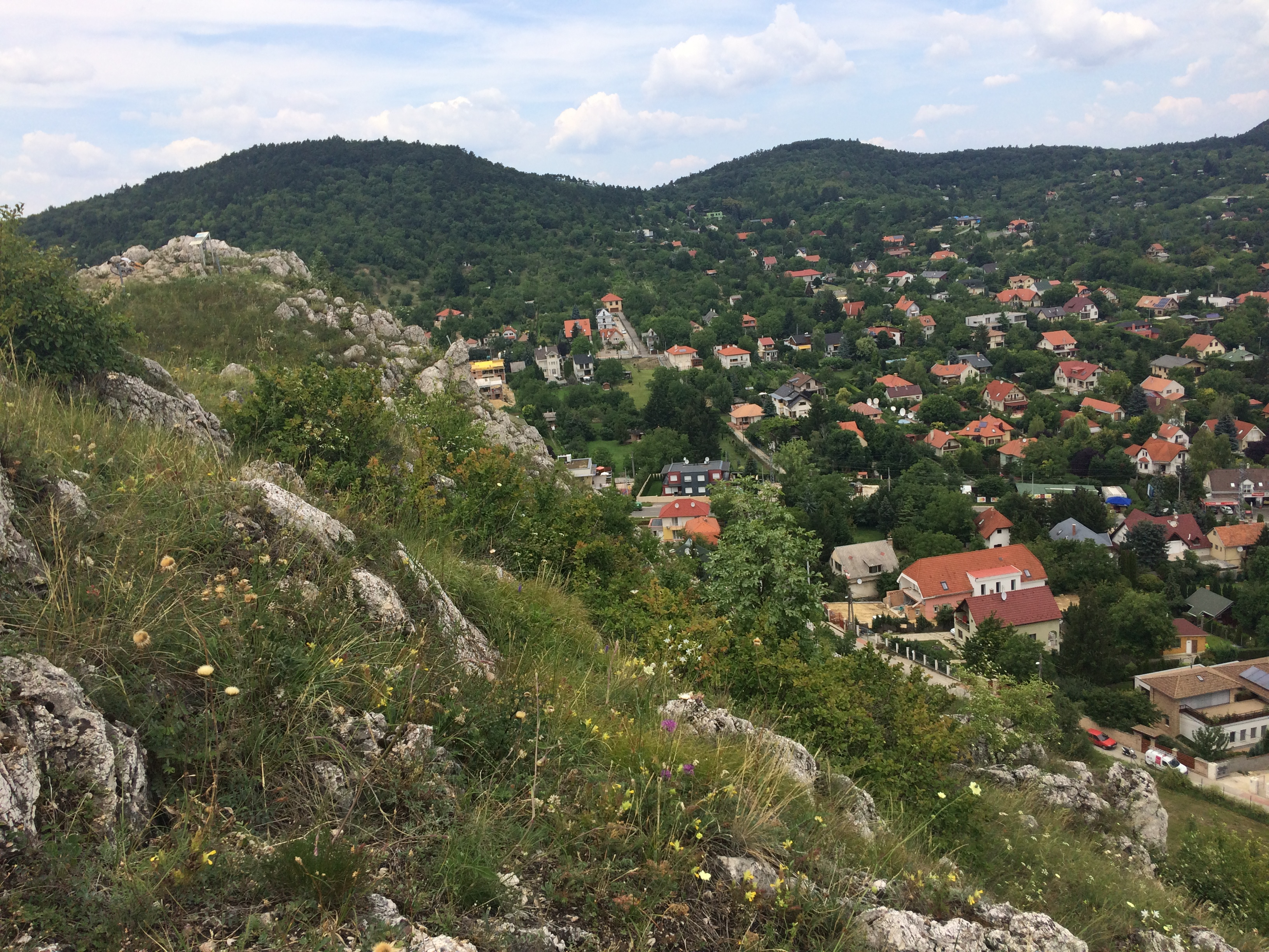 Látvány a Törökugratóról az Odvas-hegy irányába, Budaörs